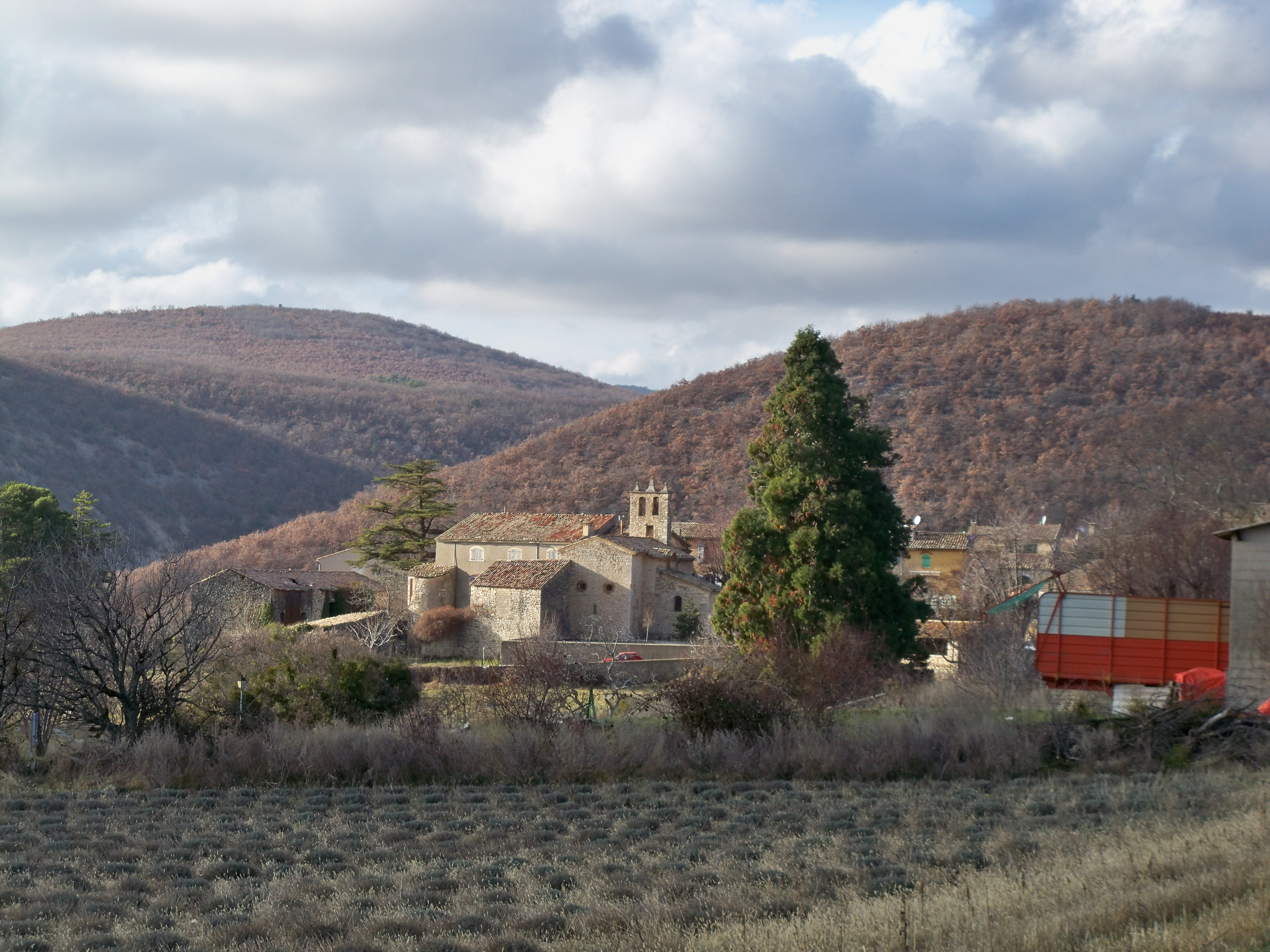 vue dur le village de Lardiers, Alpes de Haute Provence, France